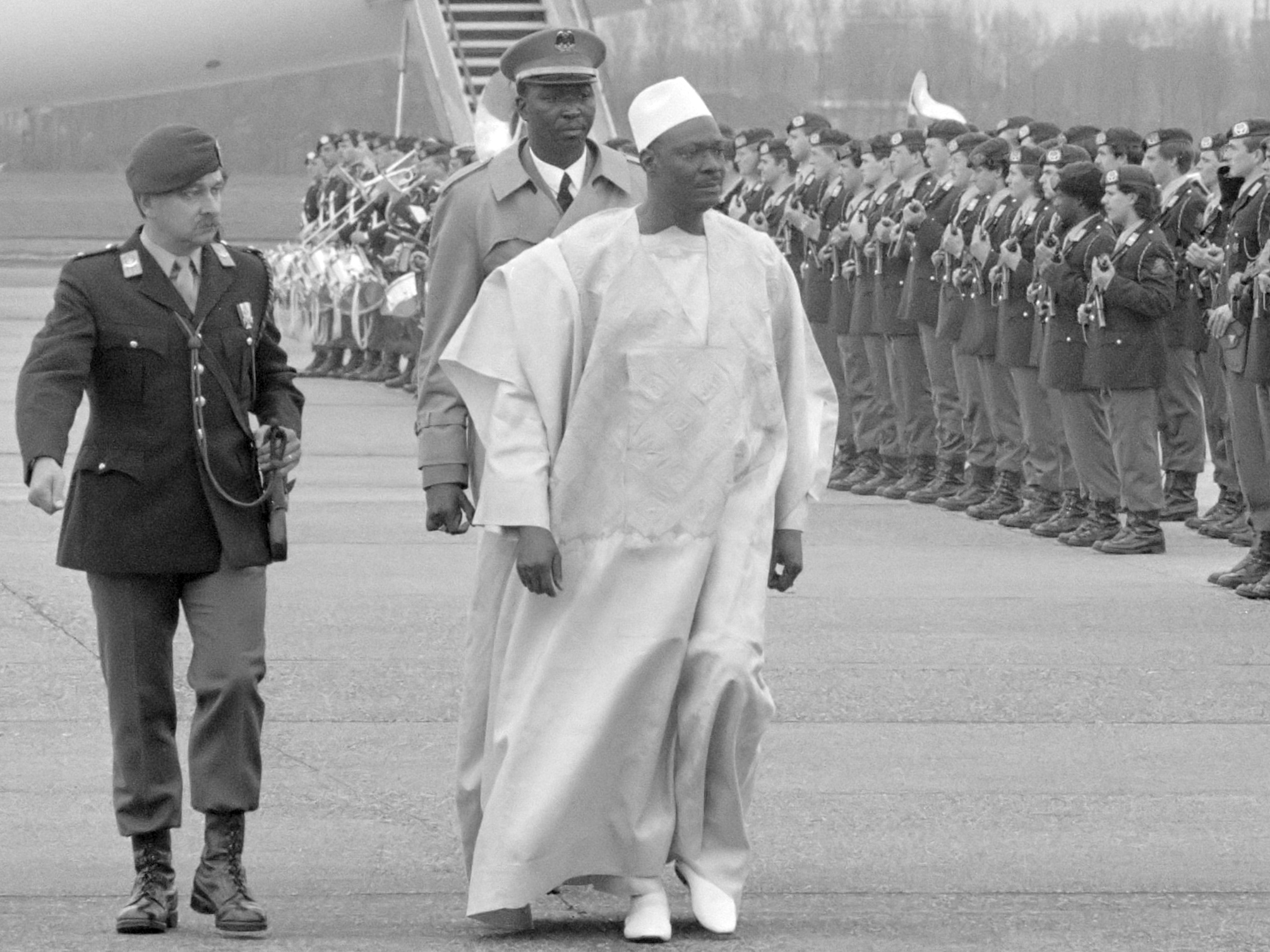 President Moussa Traore van Mali komt aan op luchthaven Zestienhoven 12 april 1989